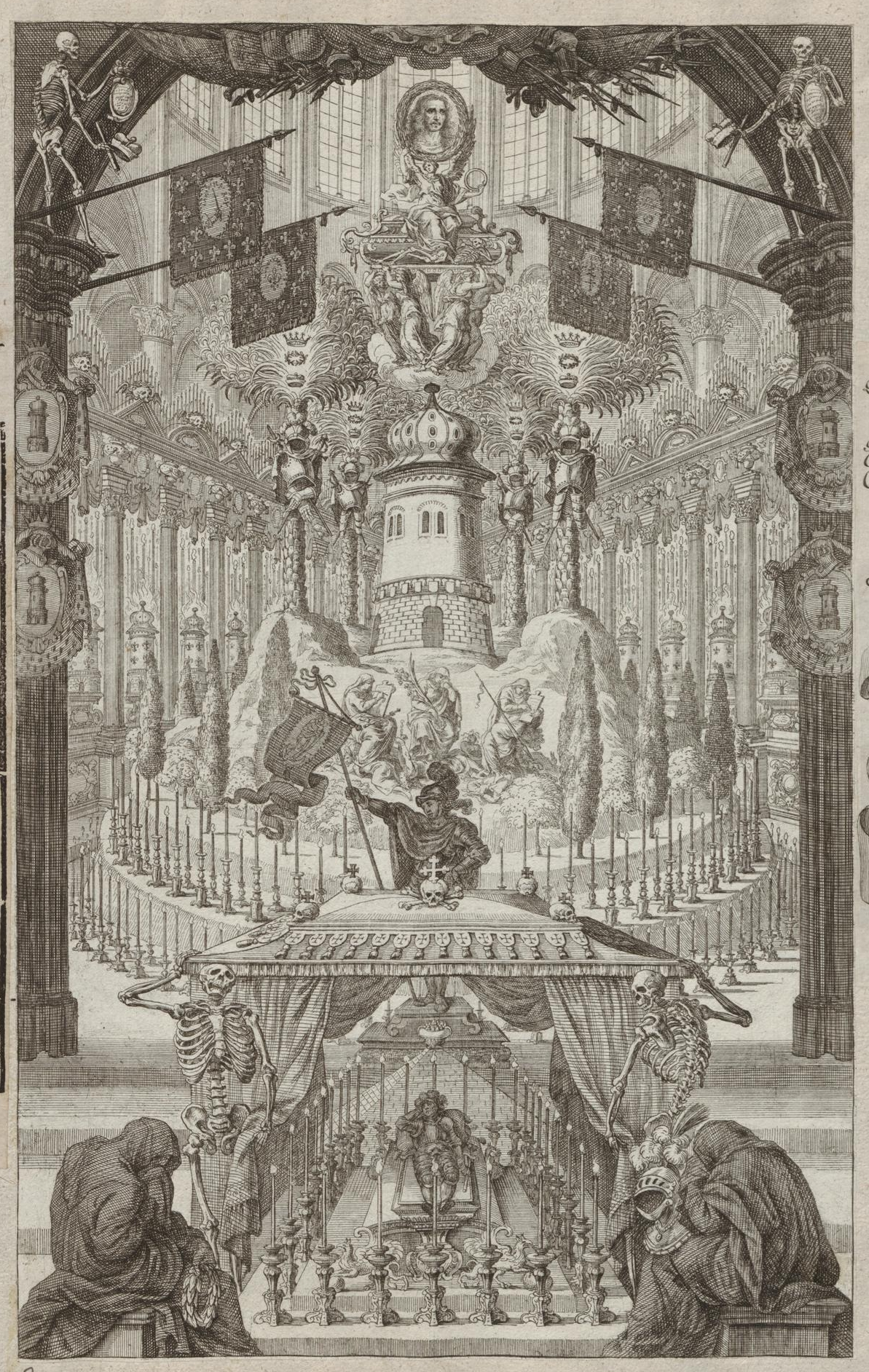 Grafik aus dem Klebeband Nr. 16 („Leichbegängnisse“) der Fürstlich Waldeckschen Hofbibliothek Arolsen Motiv: Katafalk für Henri de La Tour d’Auvergne, vicomte de Turenne († 1675), in Notre-Dame, Paris Siehe auch